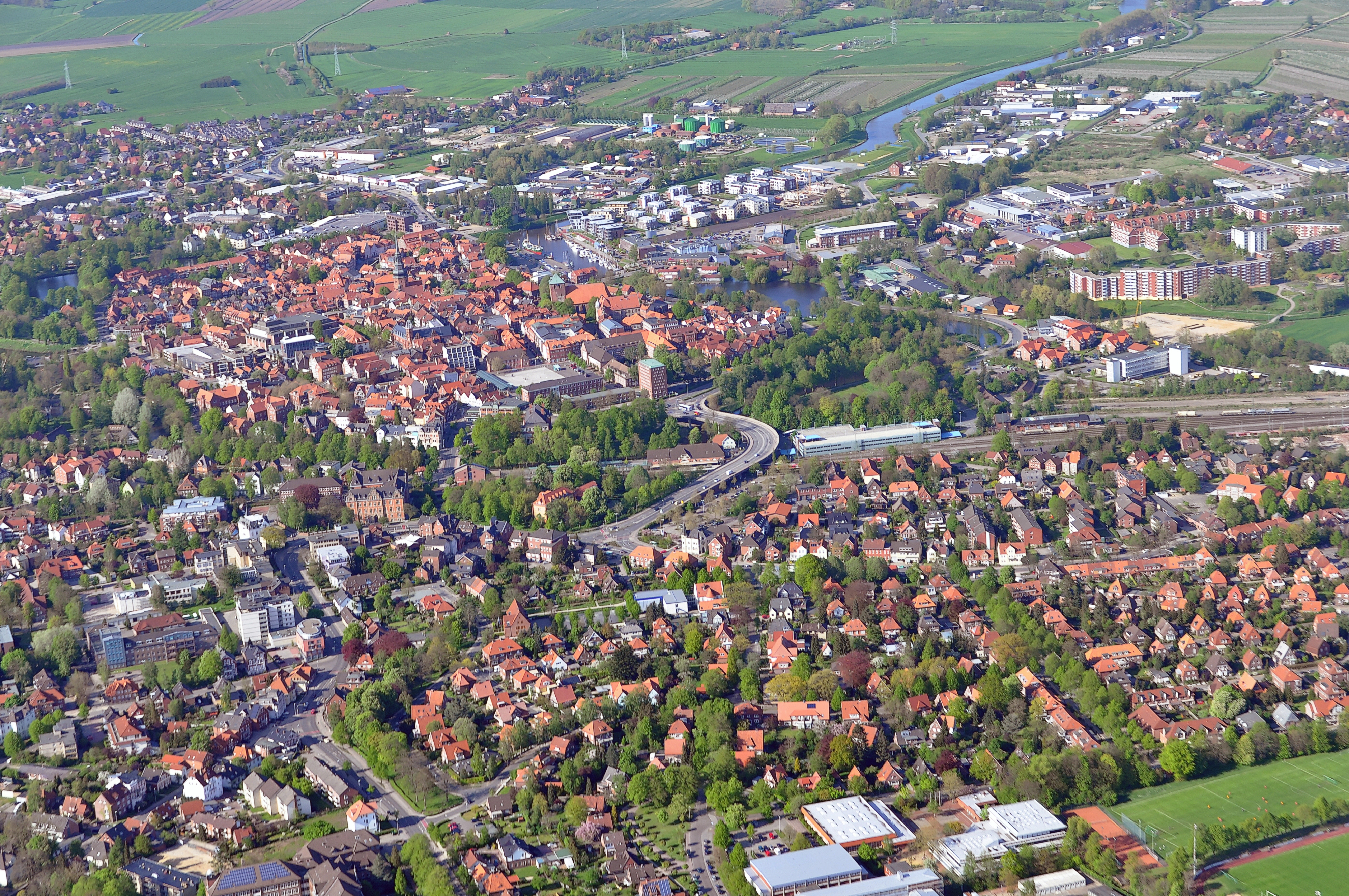 Luftbilder von der Nordseeküste 2012-05